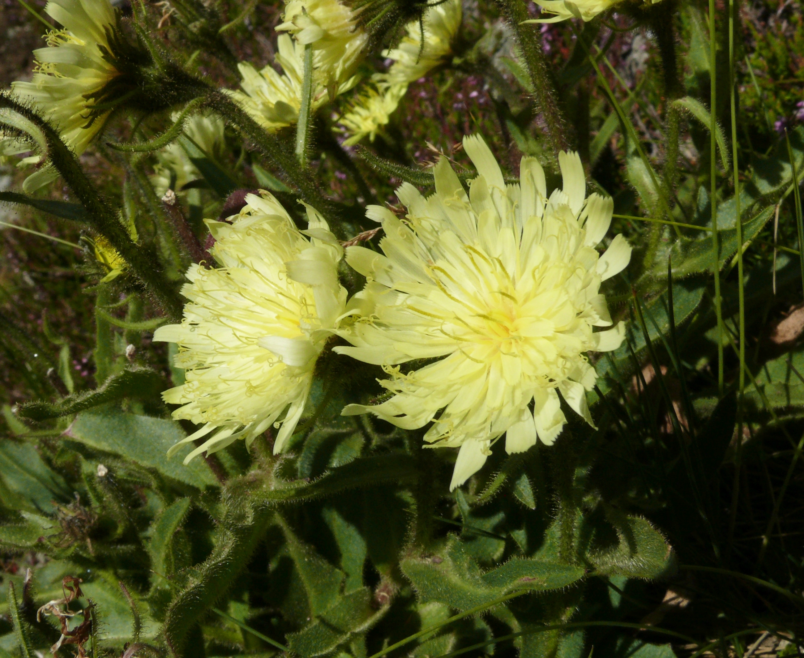 Hieracium intybaceum, Zillertaler Alpen, Italien